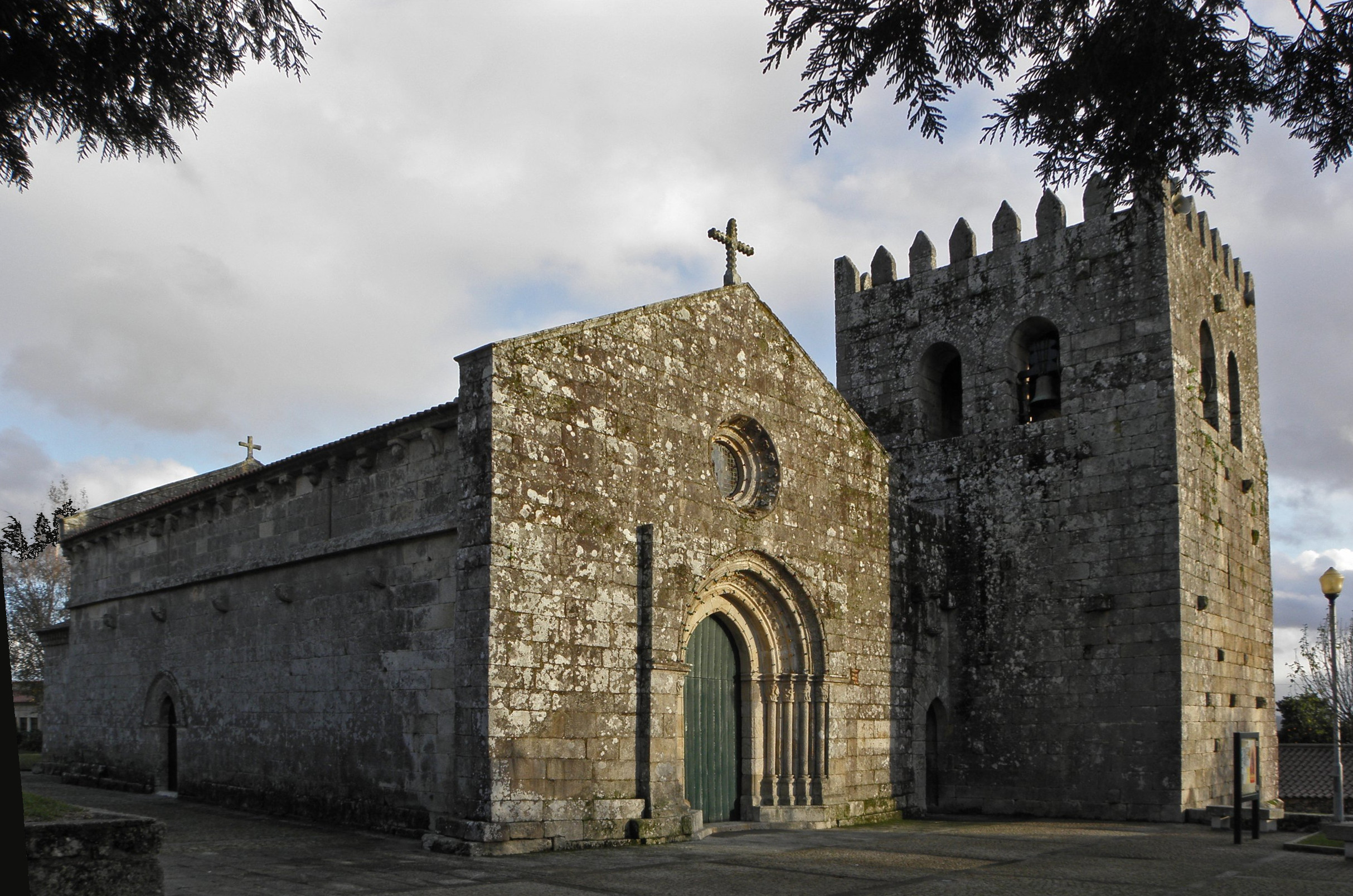 Igreja de Santa Maria de Abade de Neiva (Barcelos)